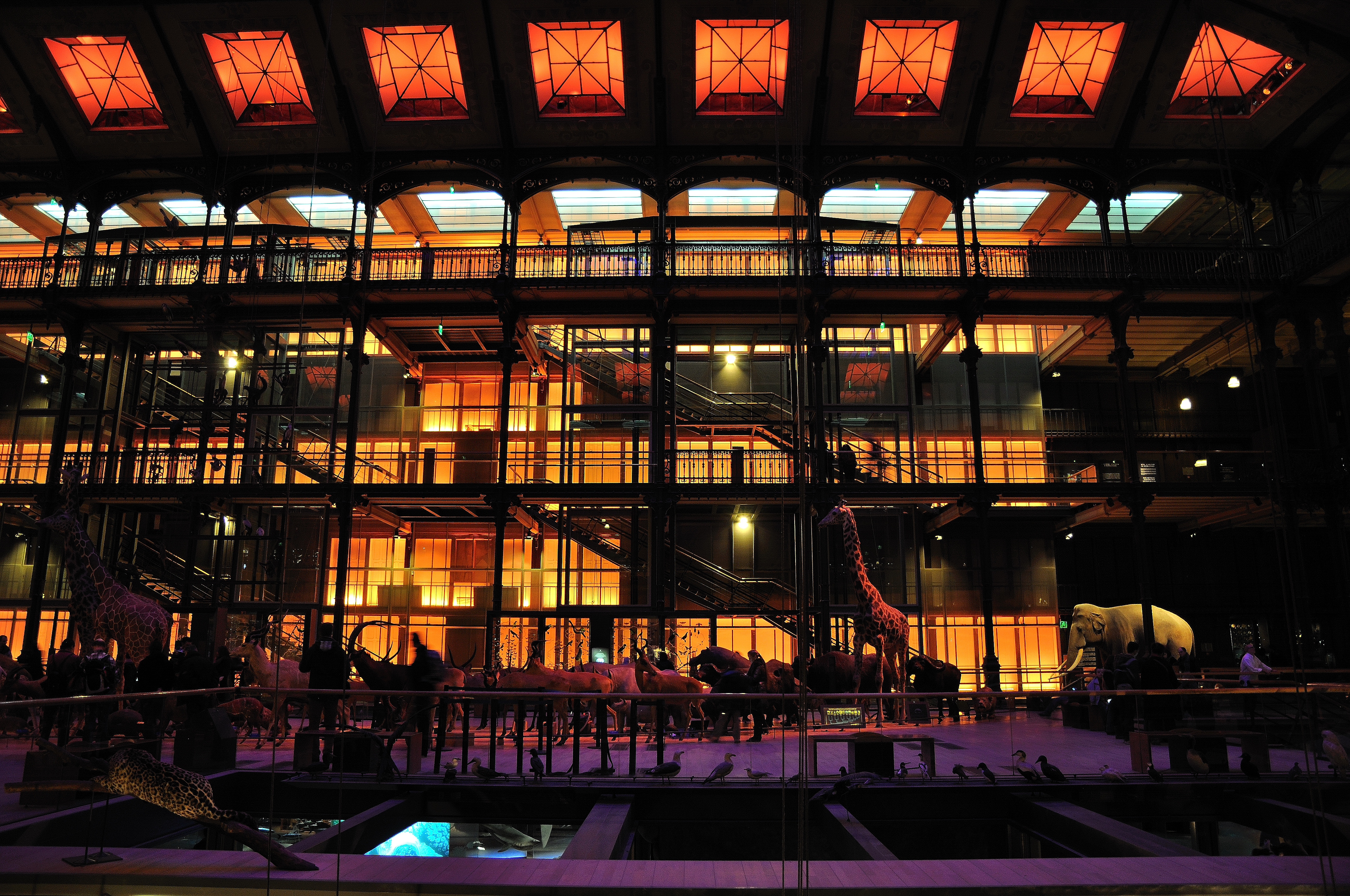 Ambiance de la nouvelle Galerie de l'Evolution - Muséum National d'histoire naturelle - Paris.